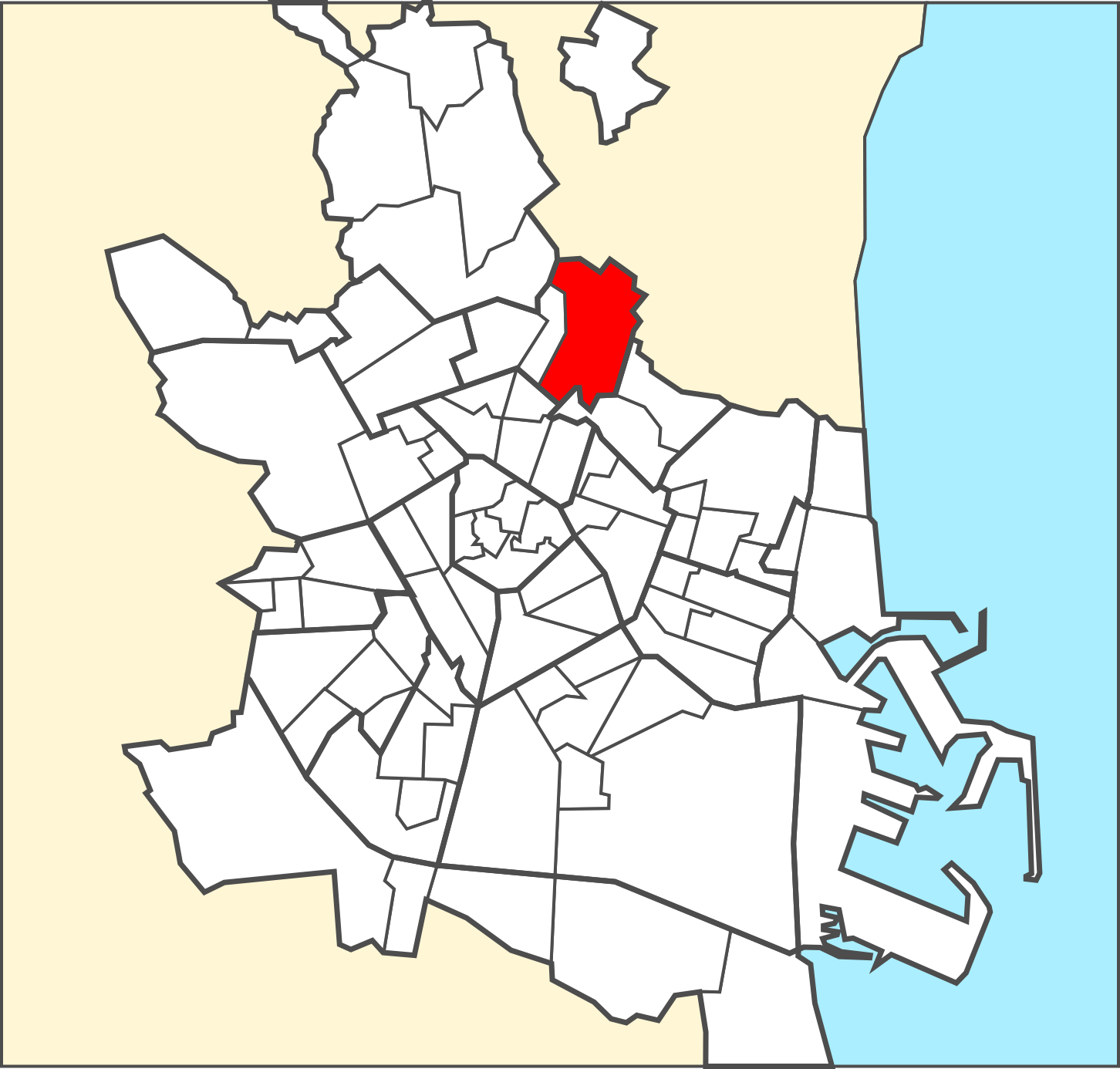 Localització del barri dins de la ciutat de València.